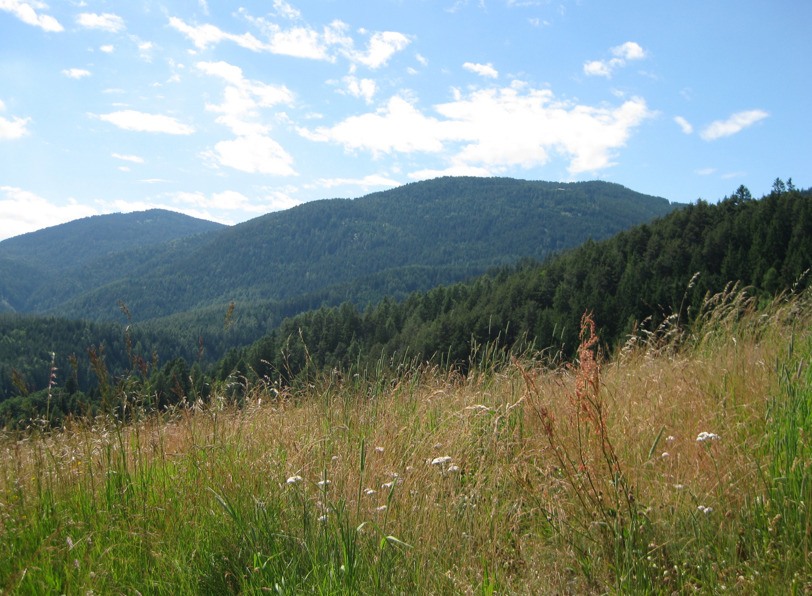 Trudner Horn von Altrei aus gesehen